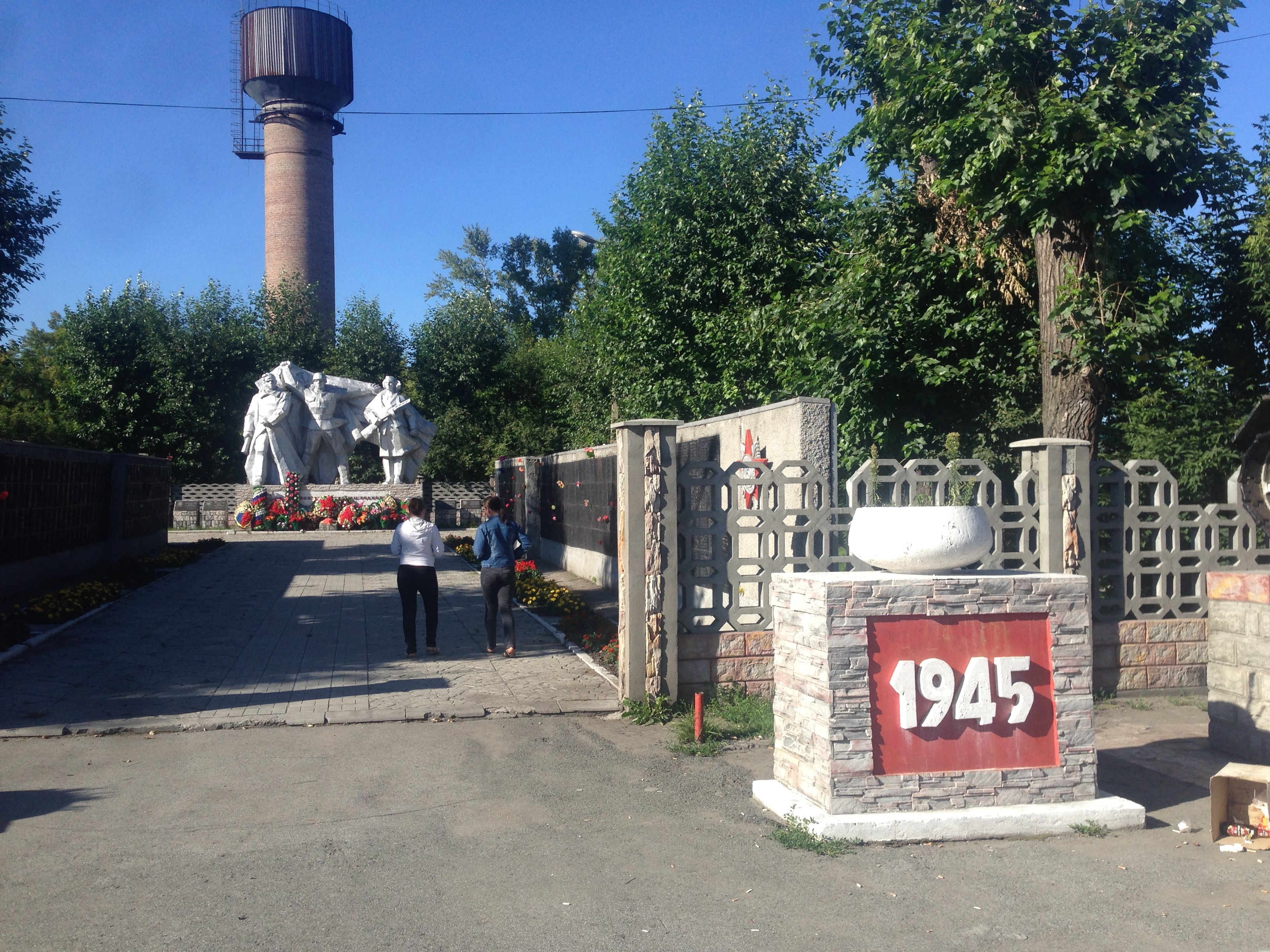 Memorial